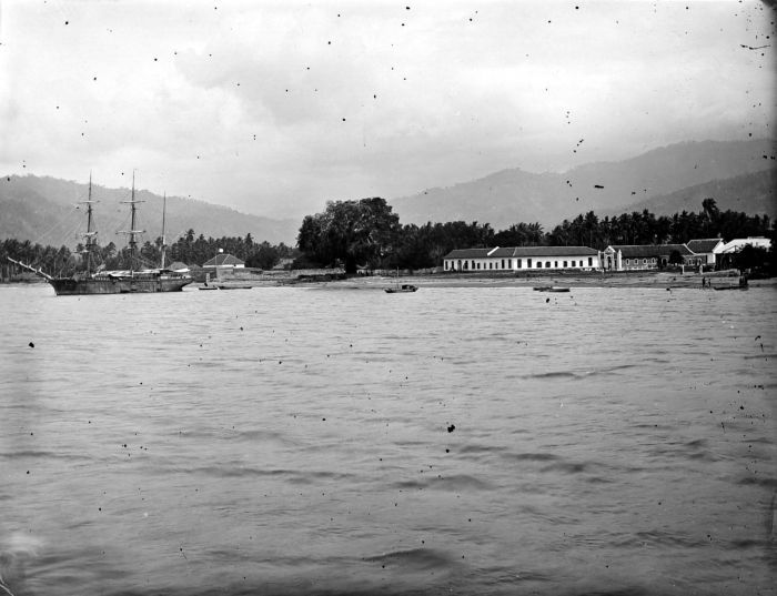 Negatief. Boten langs de kust van Timor